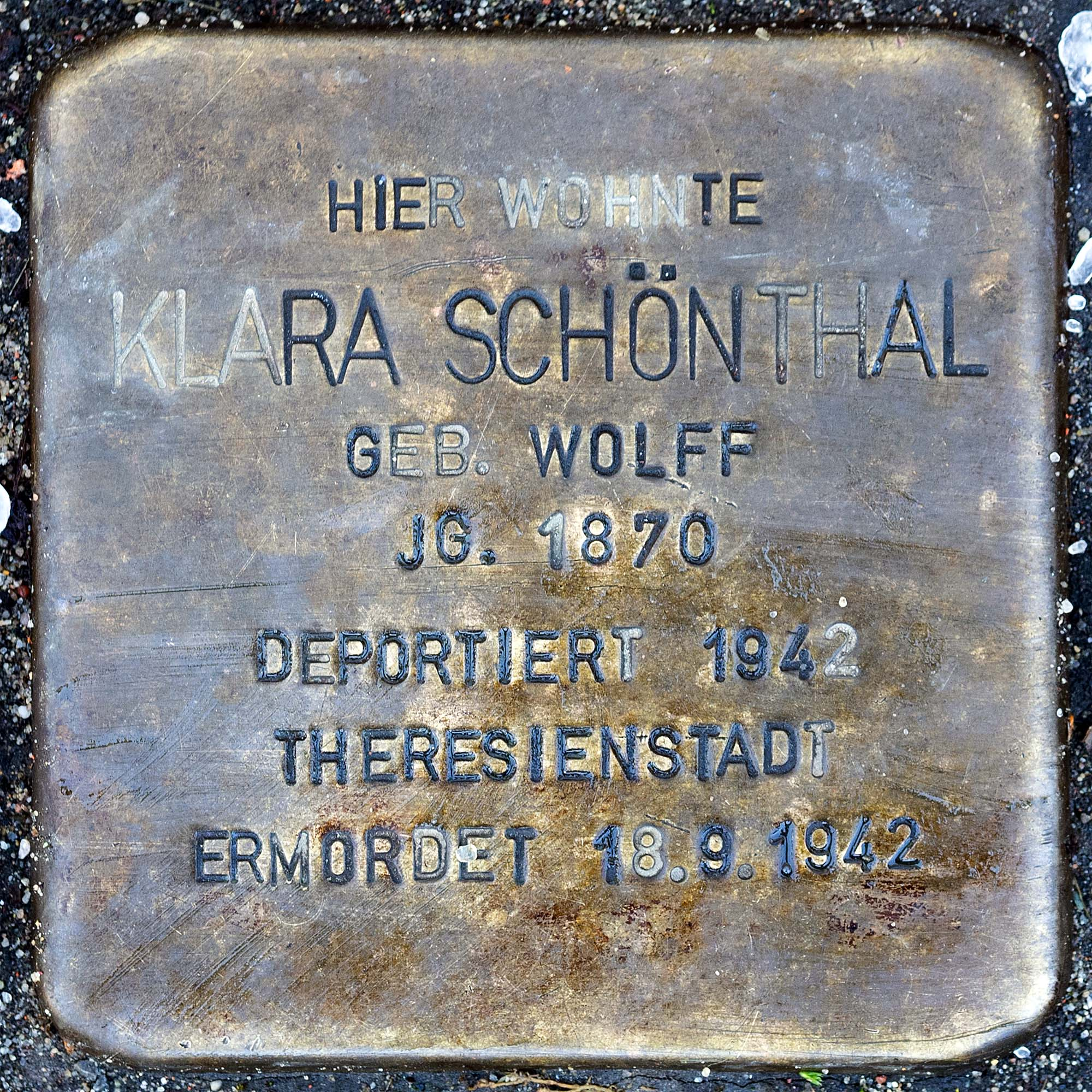 Stolperstein für Schoenthal Klara